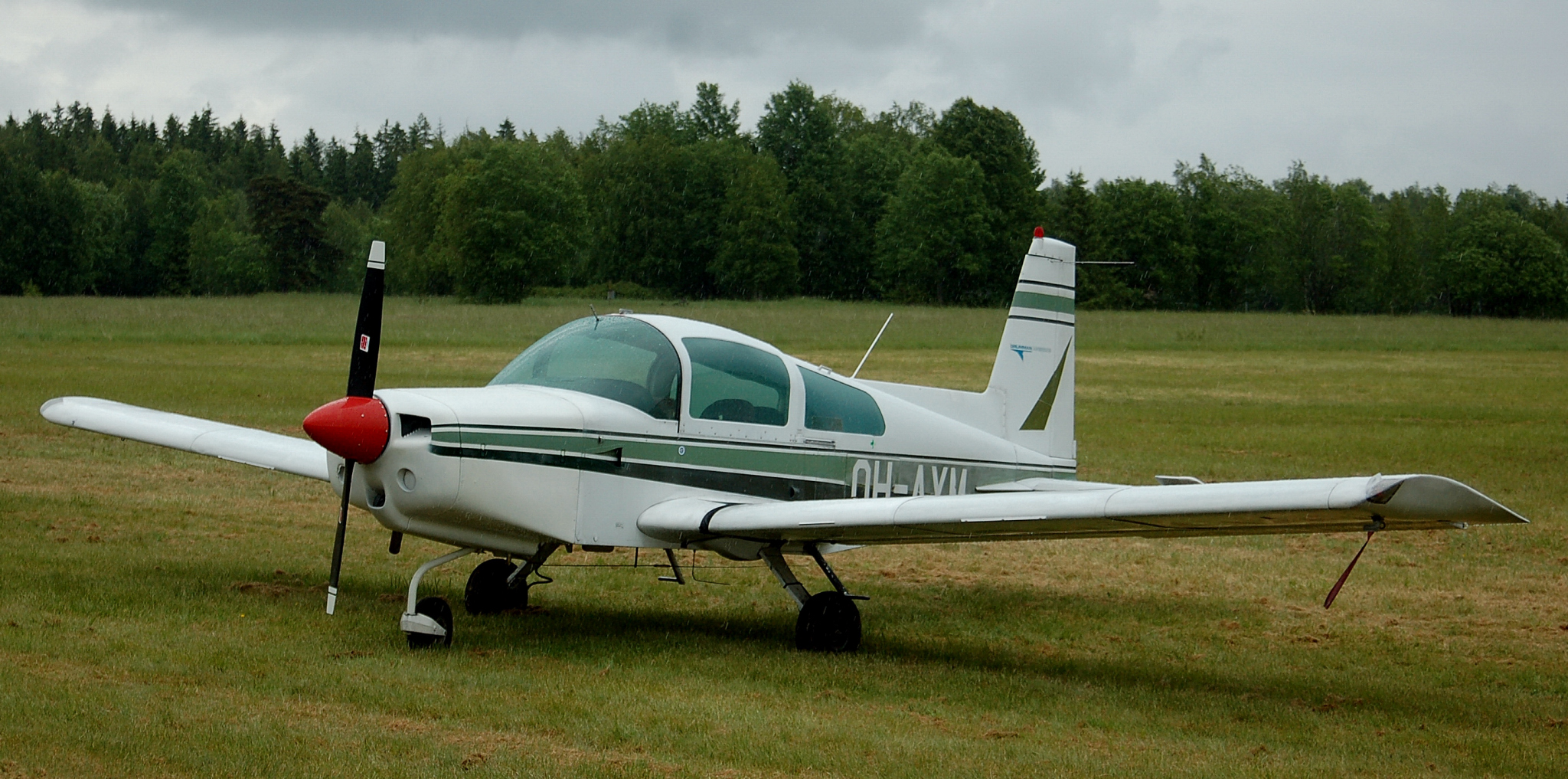 OH-AYM Grumman American AA-5 Traveler